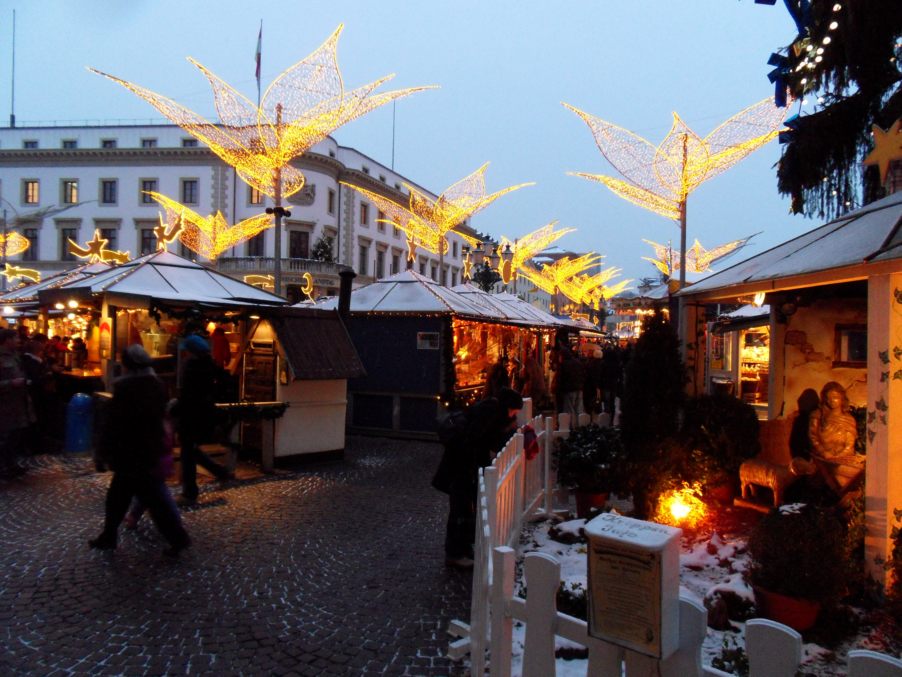 Sternschnuppenmarkt zur Adventszeit auf dem Schloßplatz in Wiesbaden